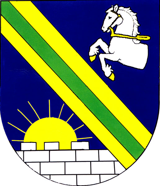 Znak obce Raná (okres Chrudim)